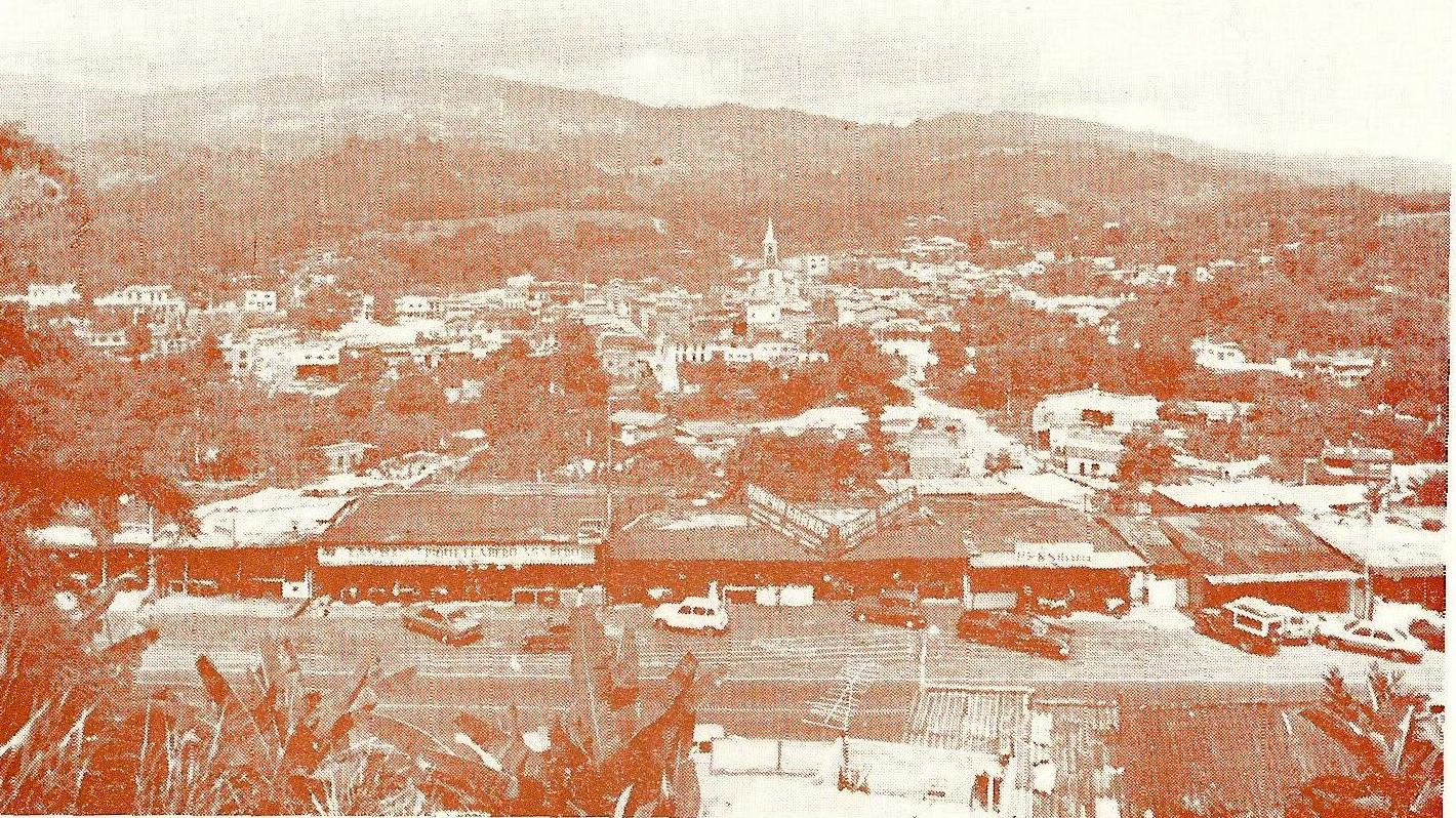 Silvania en los años 50